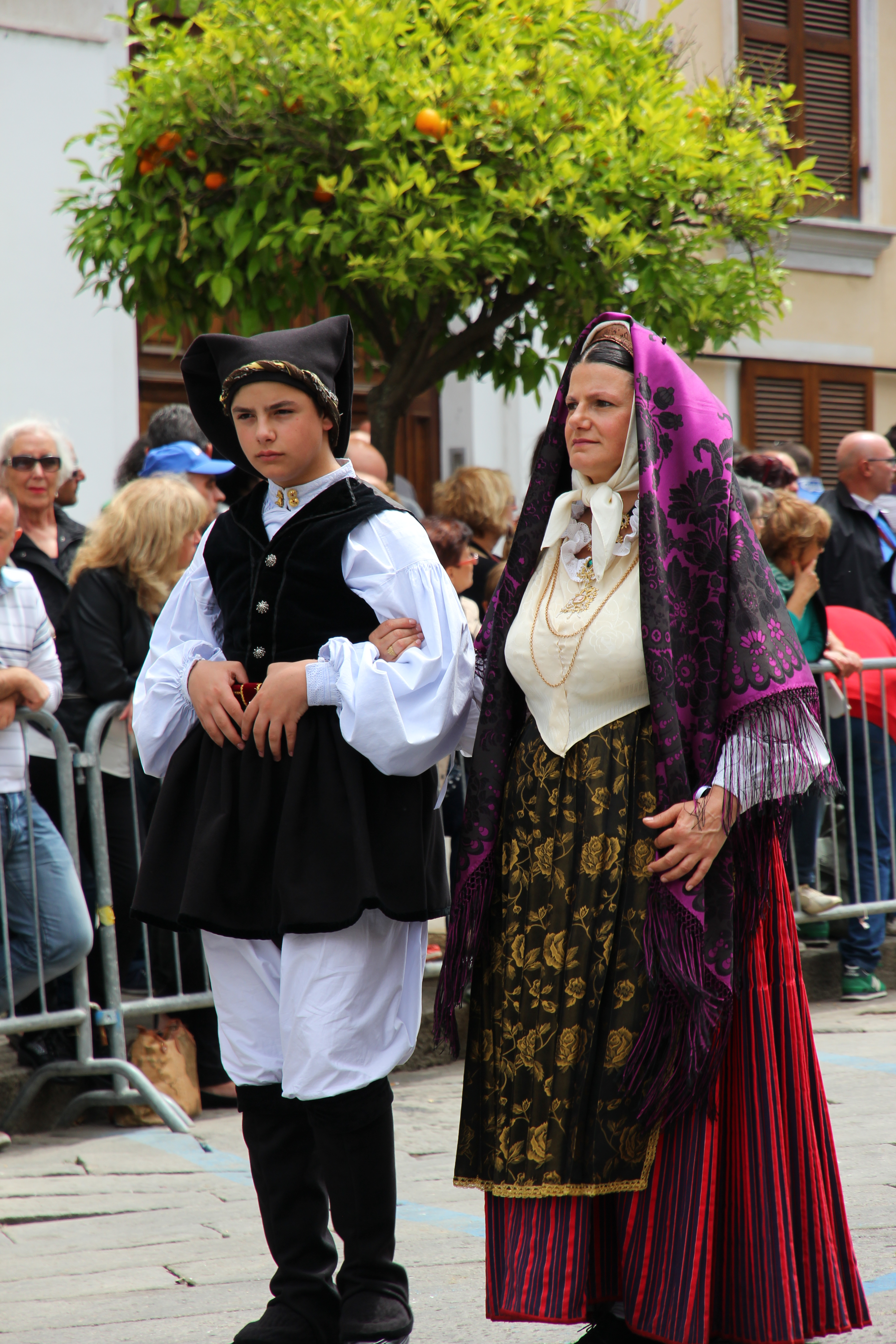 Costume tradizionale